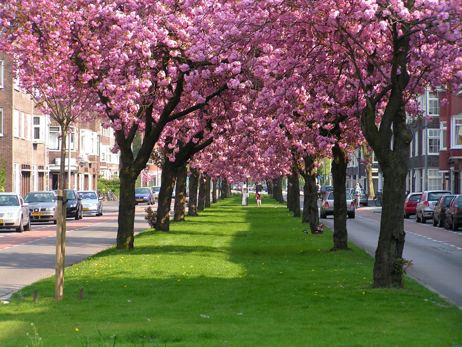 Prunus serrulata 'Kanzan' in Groningen